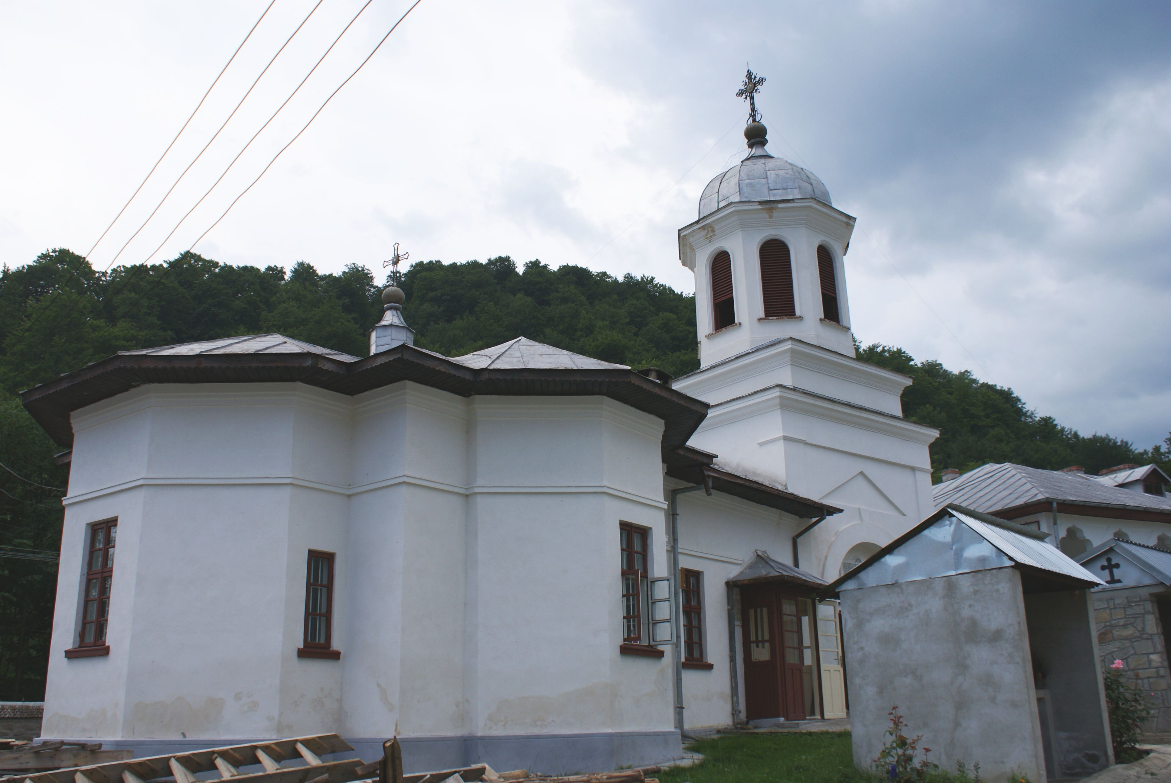 Paraclisul "Acoperământul Maicii Domnului" 02